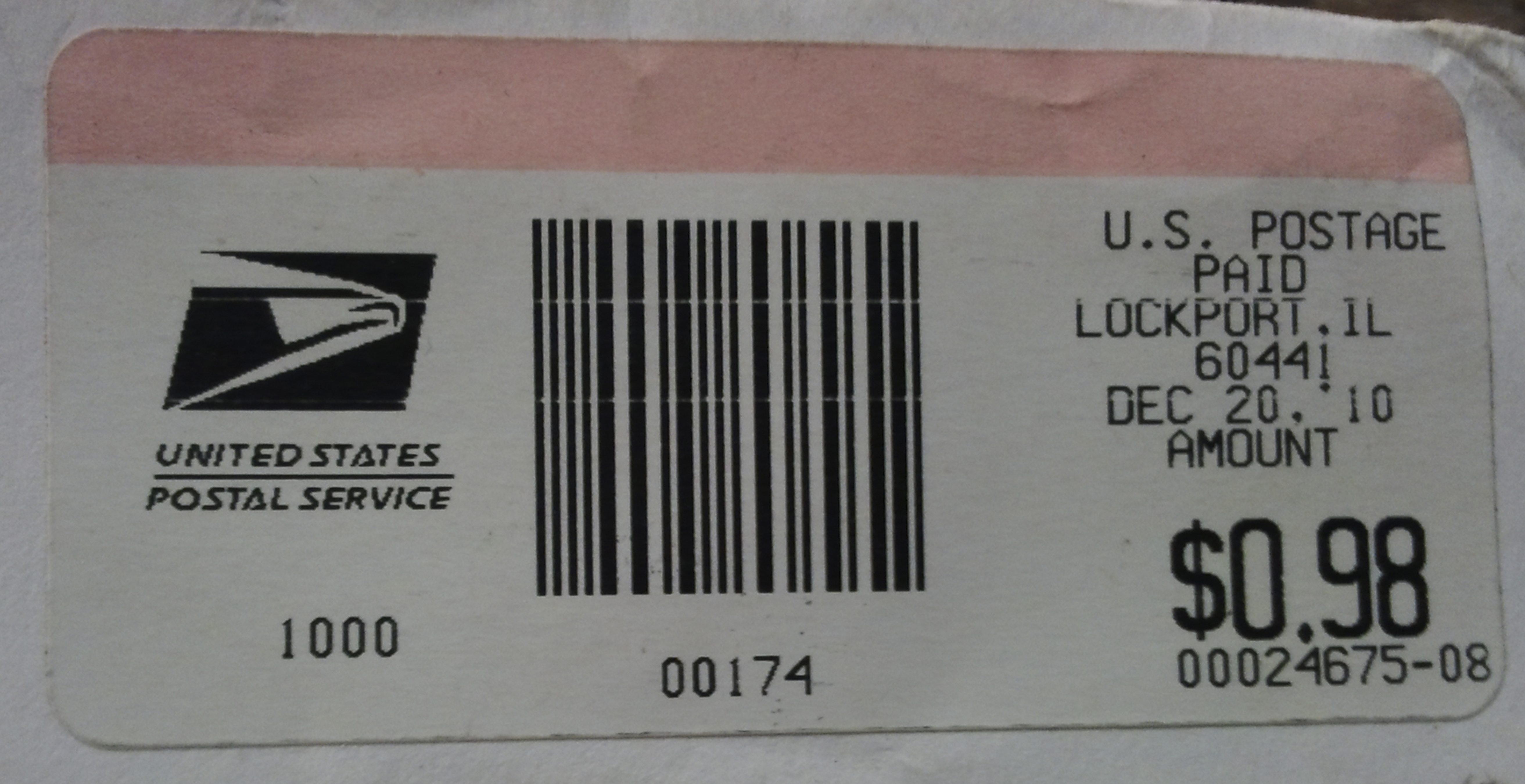 കമ്പ്യൂട്ടർ നിർമ്മിത അമേരിക്കൻ സ്റ്റാമ്പ്